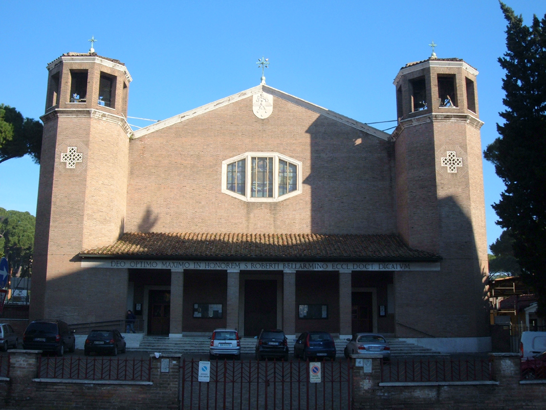 Chiesa di San Roberto Bellarmino, a Roma, nel quartiere Parioli.